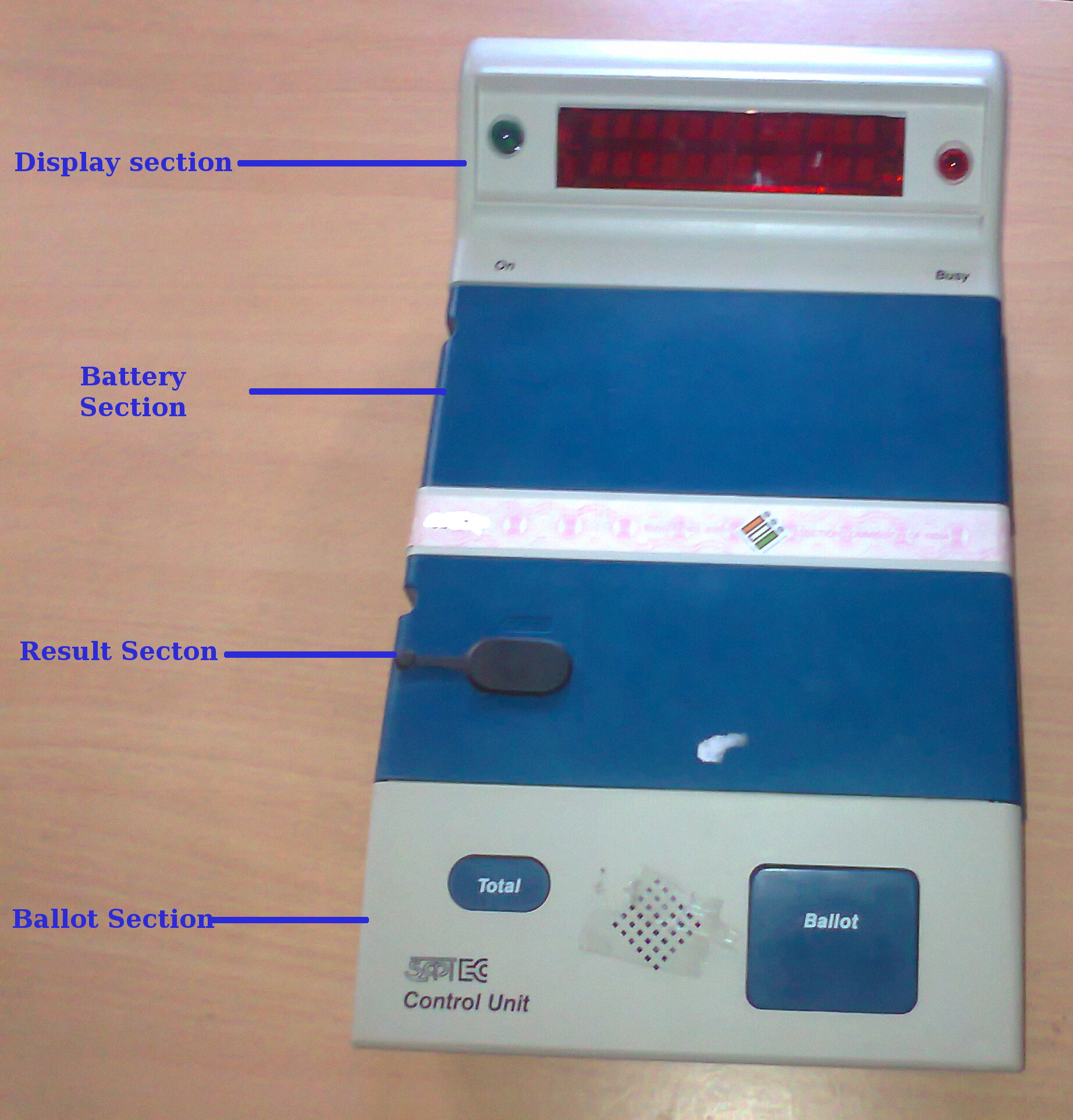 ഇലക്ട്രോണിക് വോട്ടിംഗ് യന്ത്രത്തിന്റെ നിയന്ത്രണയൂണിറ്റ്